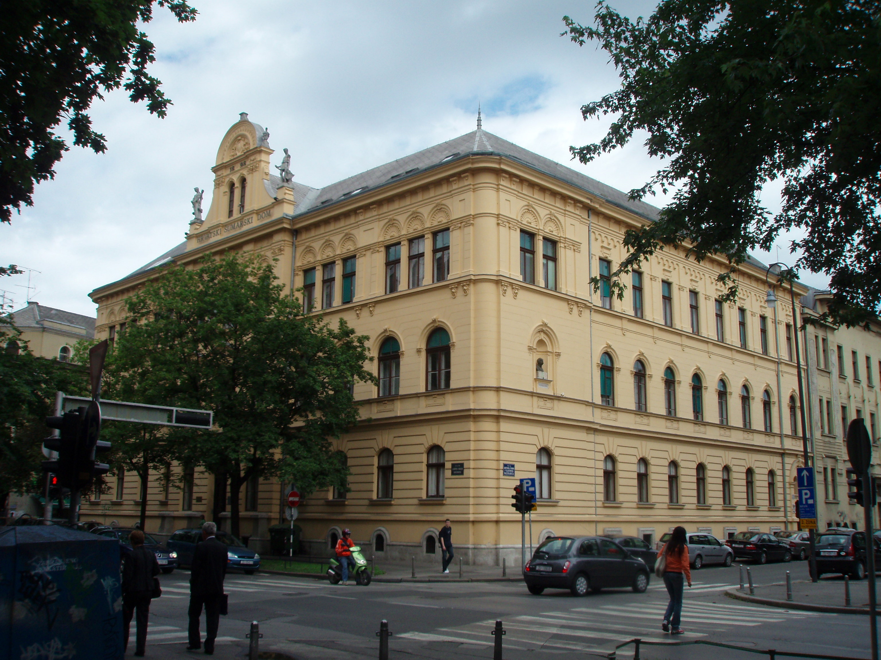 Zgrada Hrvatskog šumarskog doma u Zagrebu, na uglu Trga Mažuranića, Vukotinovićeve i Perkovčeve; sagrađena 1898.